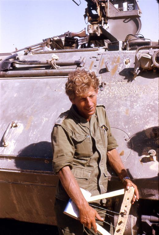 פאצי במלחמת יום כיפור 1973